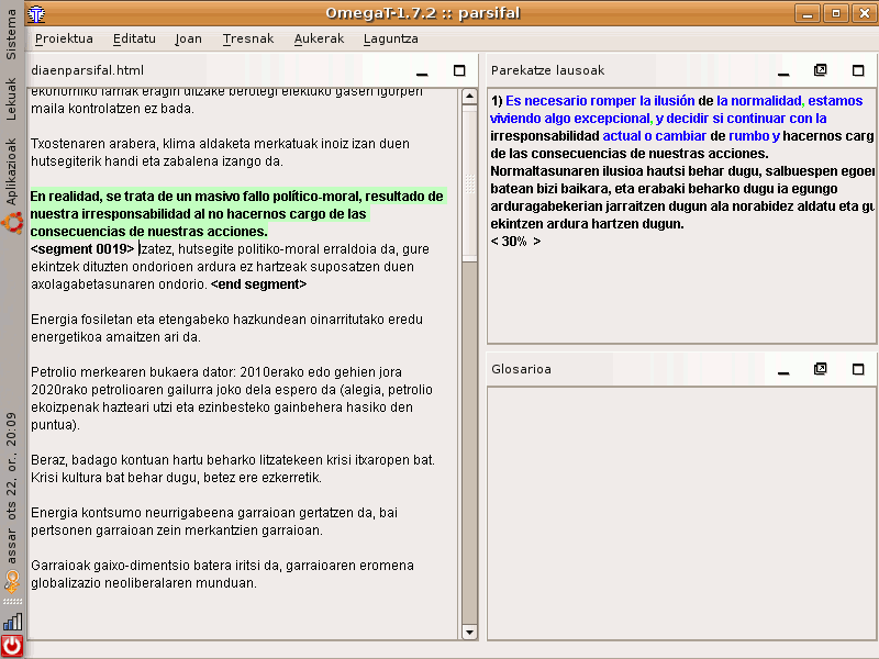 OmegaT in Basque